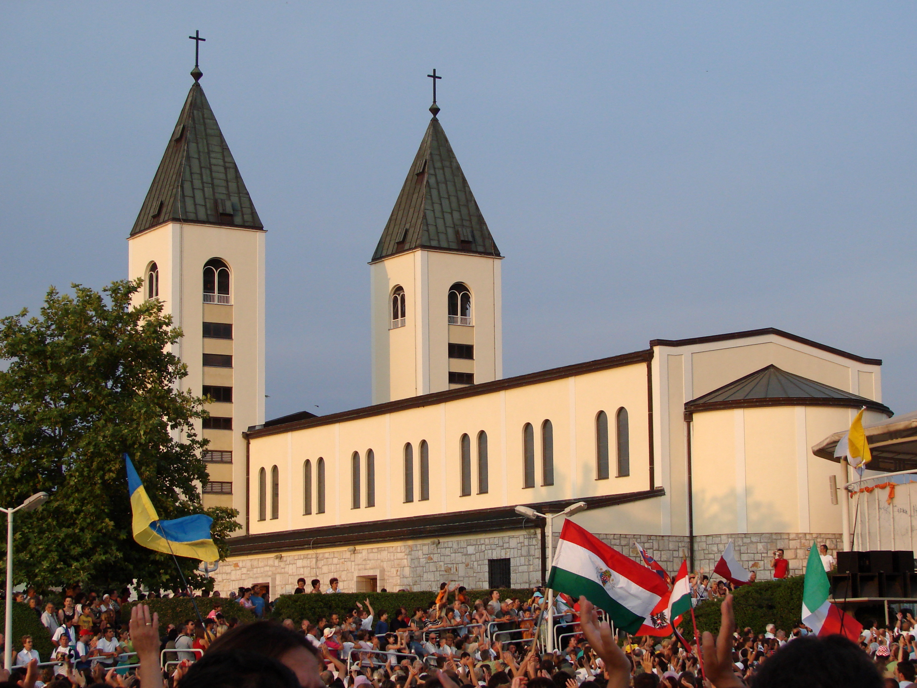 Miejscowość w Bośni i Hercegowinie położona w południowej części Hercegowiny na południowy zachód od Mostaru.